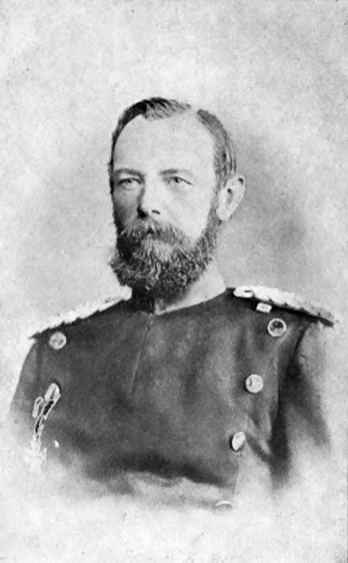 Major v. Gaza, Bataillonsführer des Großherzoglich Mecklenburgisches Jäger-Bataillon Nr. 14 1870/71